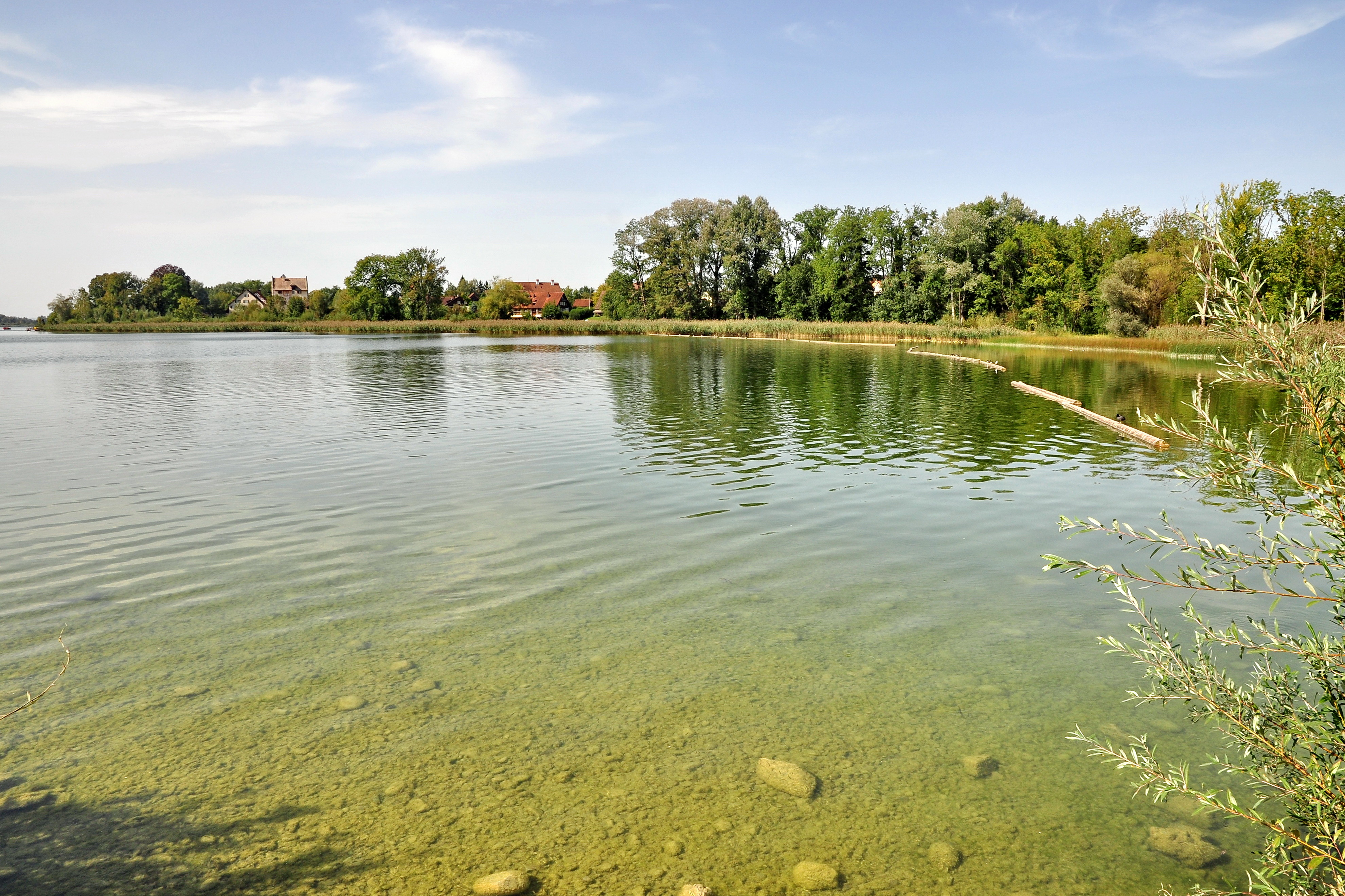 Storen, neolithische Seeufersiedlungen in Greifensee (Switzerland)